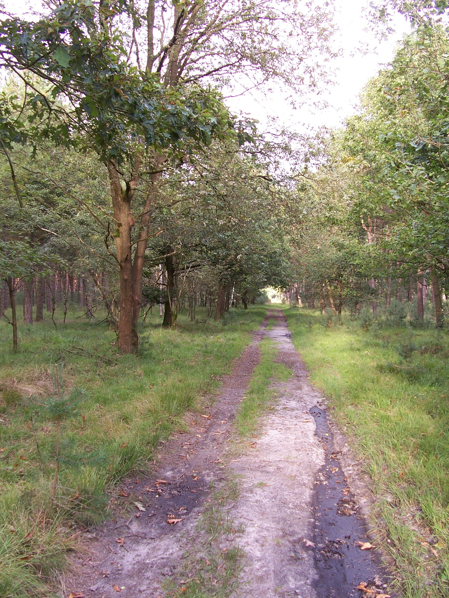 In de Laurabossen